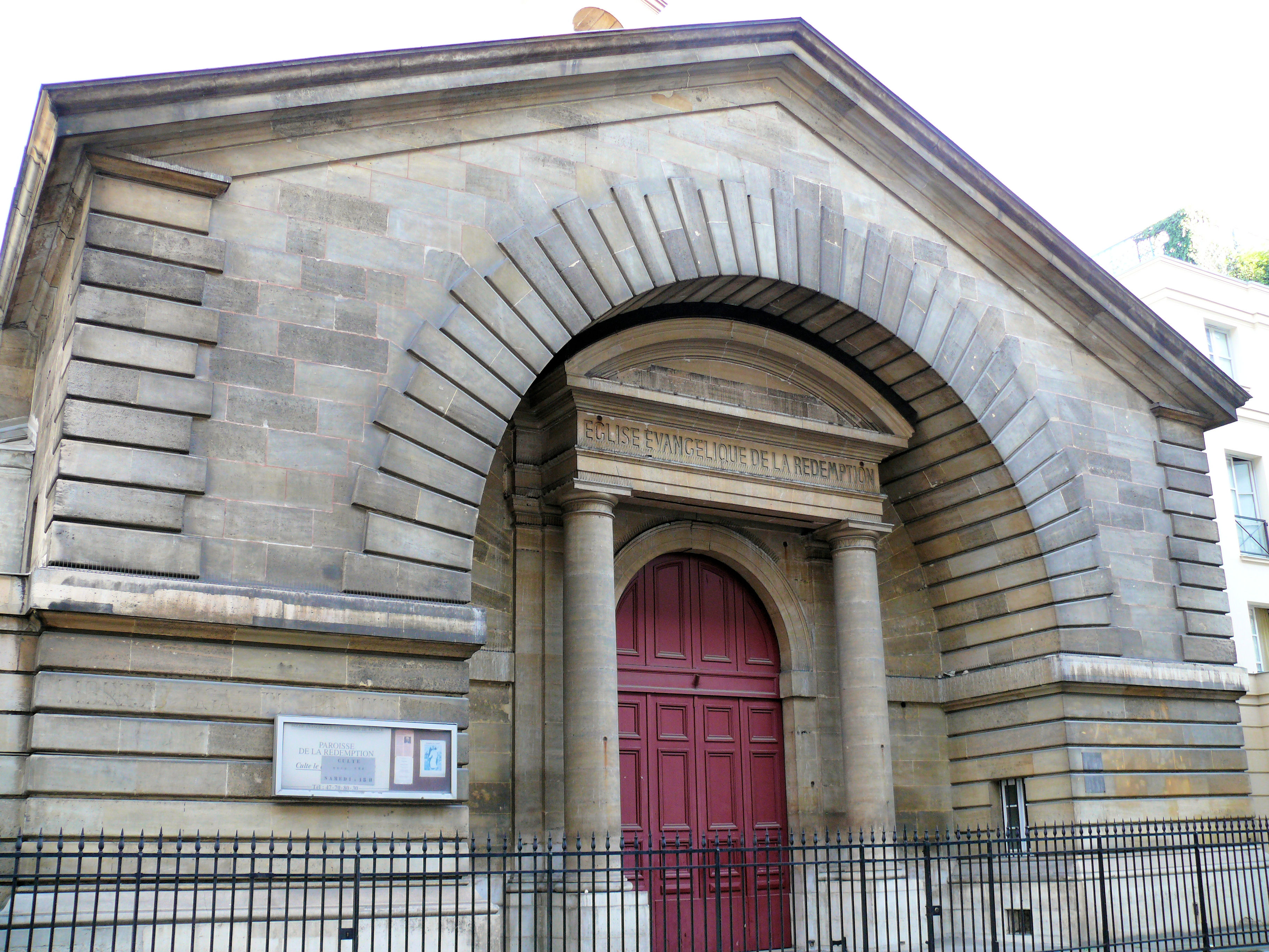 Paris 9ème arrondissement - Temple de la Rédemption